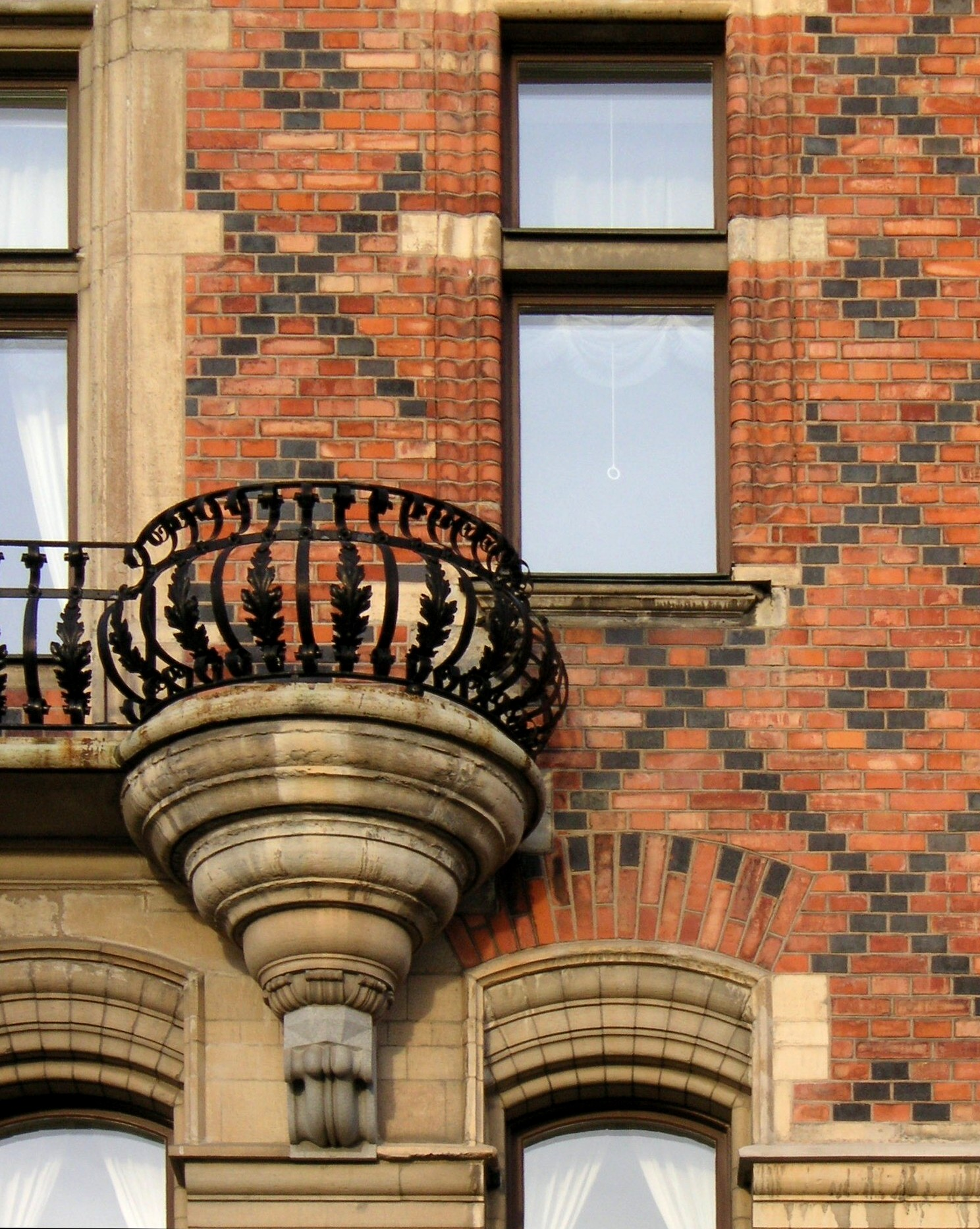 Strandvägen 29-33 i Stockholm, fasaddetalj